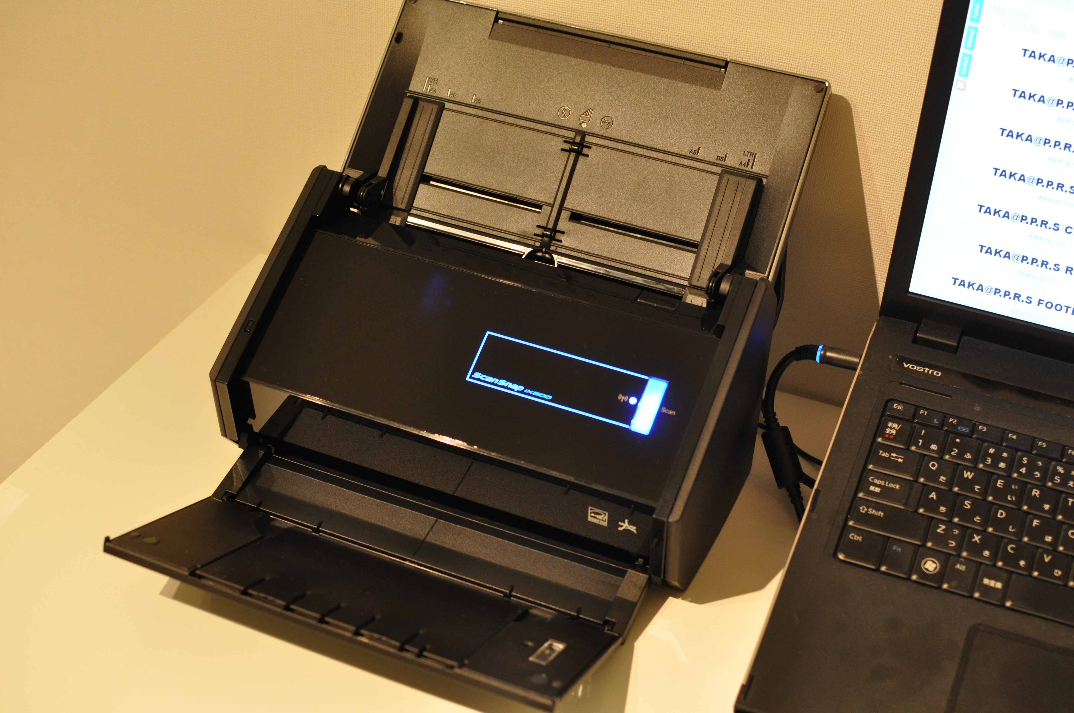 ScanSnap iX500_018